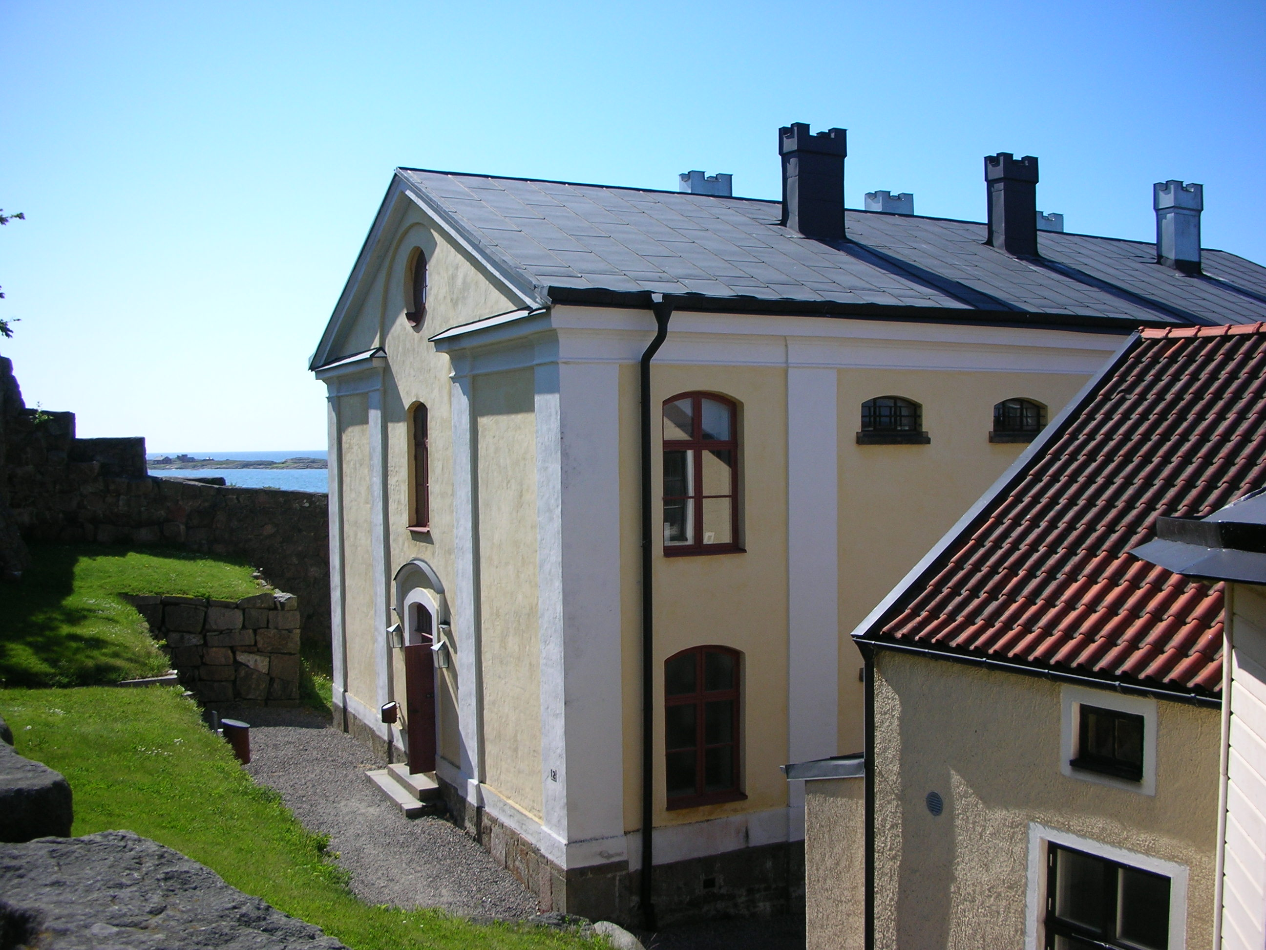 Cellfängelset, Varbergs fästning.